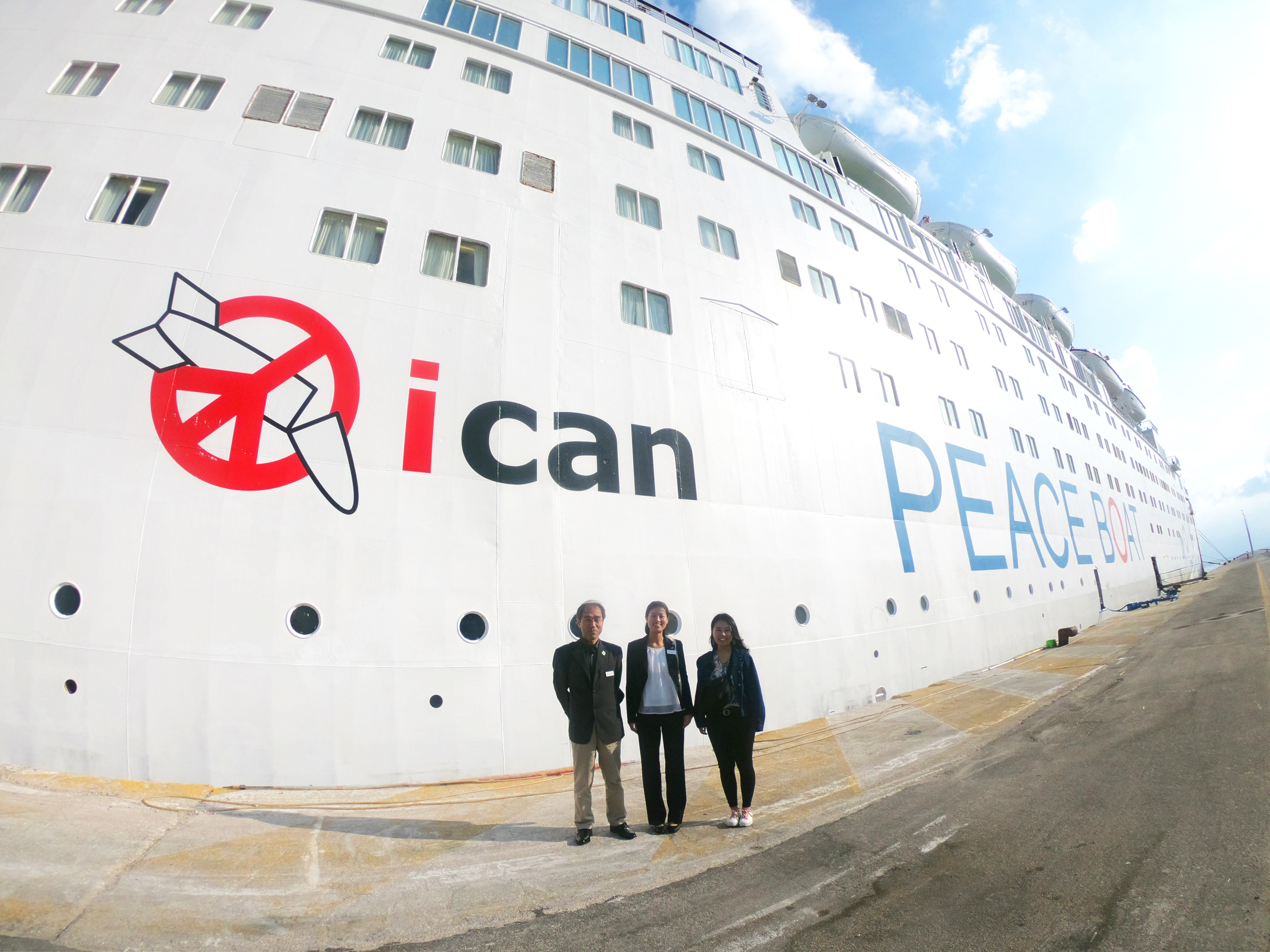 2017年12月、核兵器廃絶国際キャンペーン（ICAN）の国際運営グループとして、新たな巨大ロゴが船体にペイントされた。